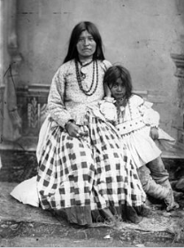 제로니모의 아내 및 자녀